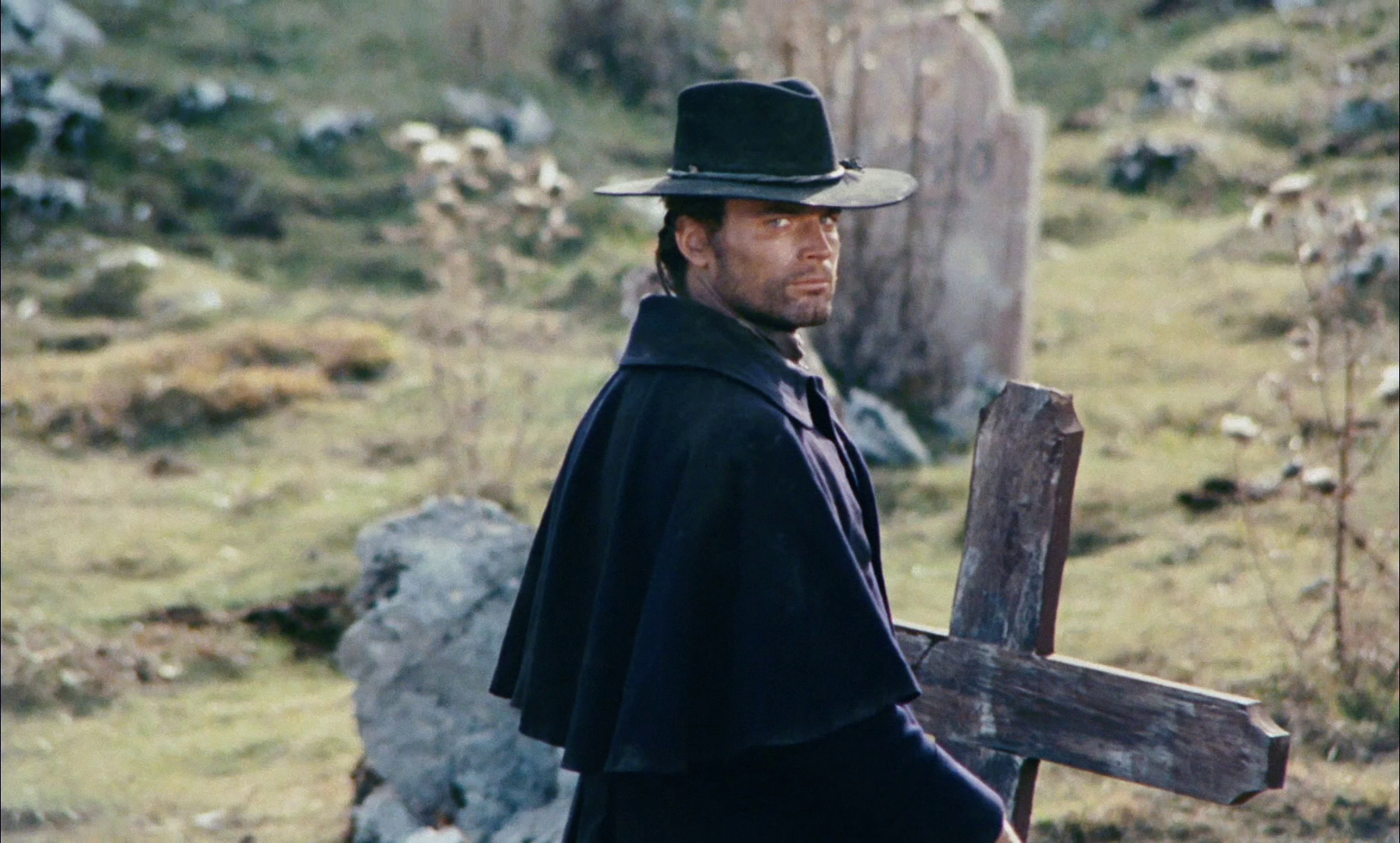 Scena del film Preparati la bara!